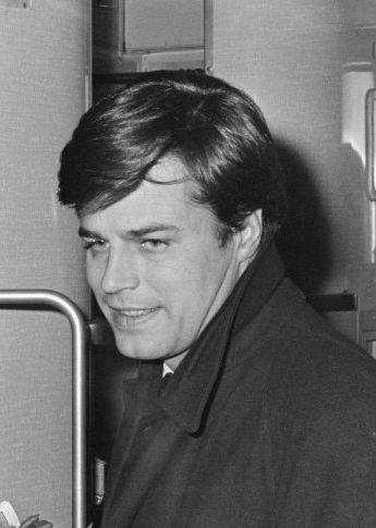 Jean Sorel à la gare centrale d'Amsterdam le 25 janvier 1966